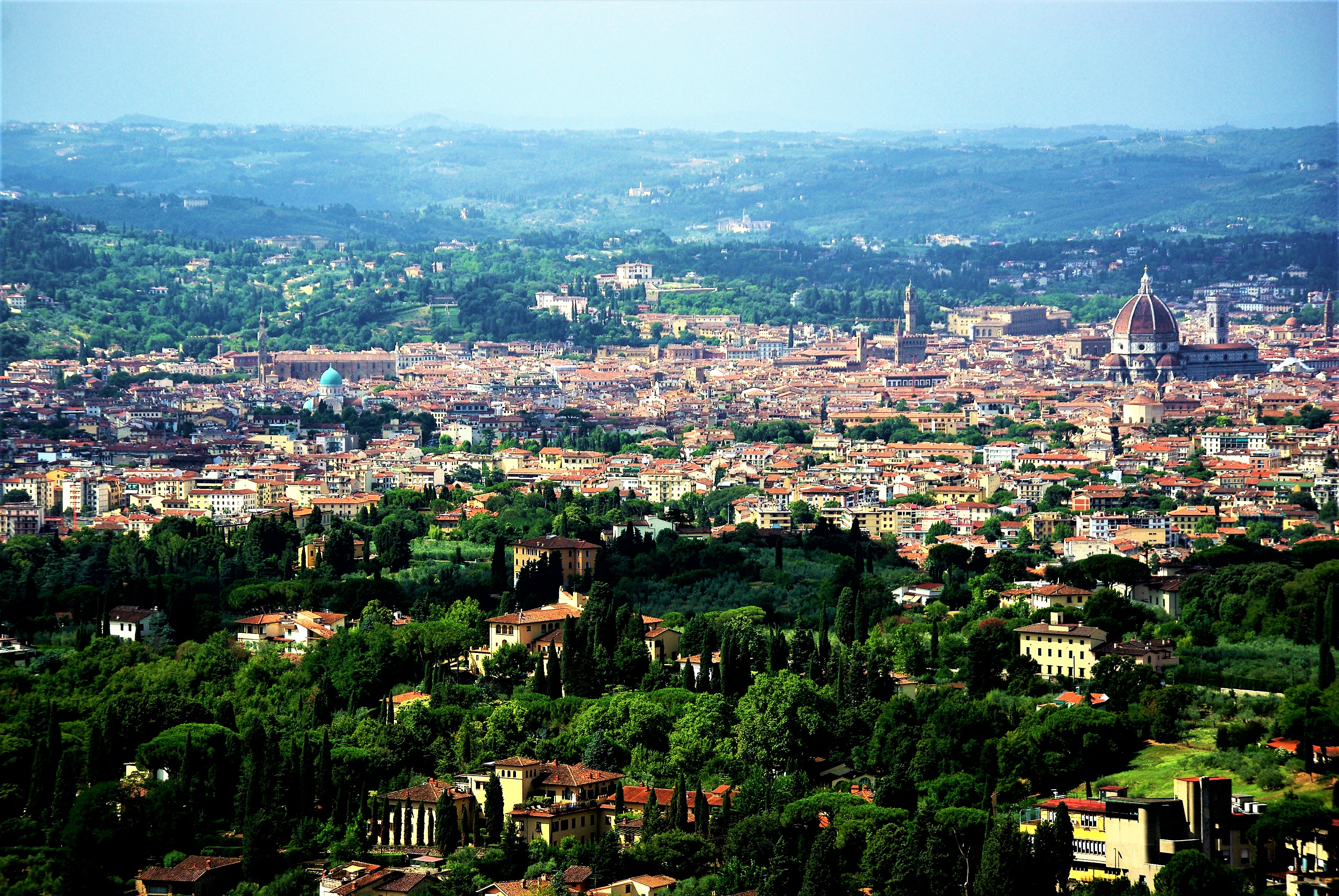 Florence vue depuis Fiesole : de droite à gauche, le Duomo, le Palazzo Vecchio et la Grande synagogue aux coupoles vertes